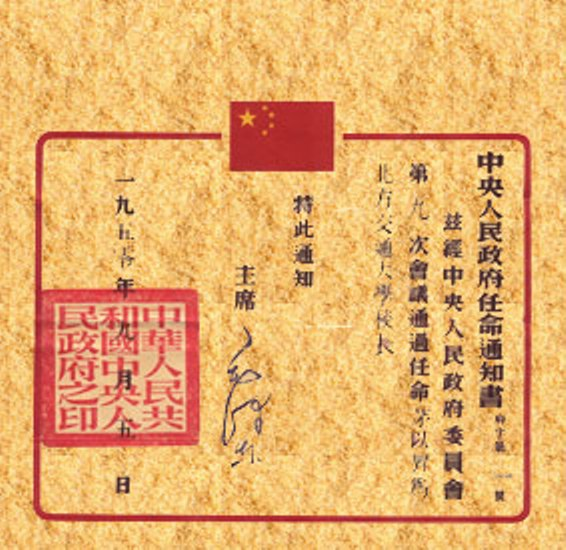 中华人民共和国中央人民政府主席毛泽东签发的聘任书，聘请茅以升教授为北方交通大学校长